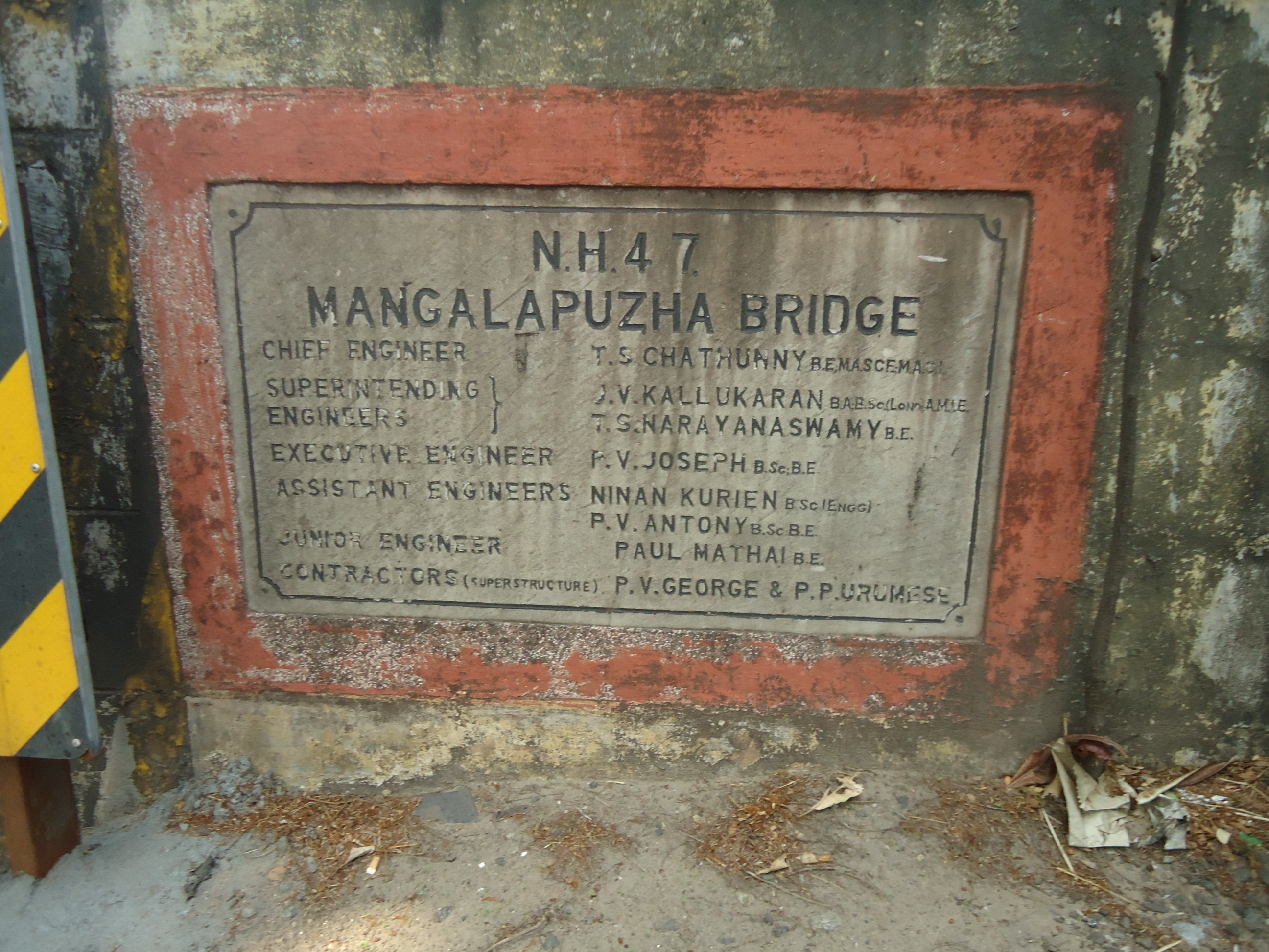 Mangalapuzha Bridge Board